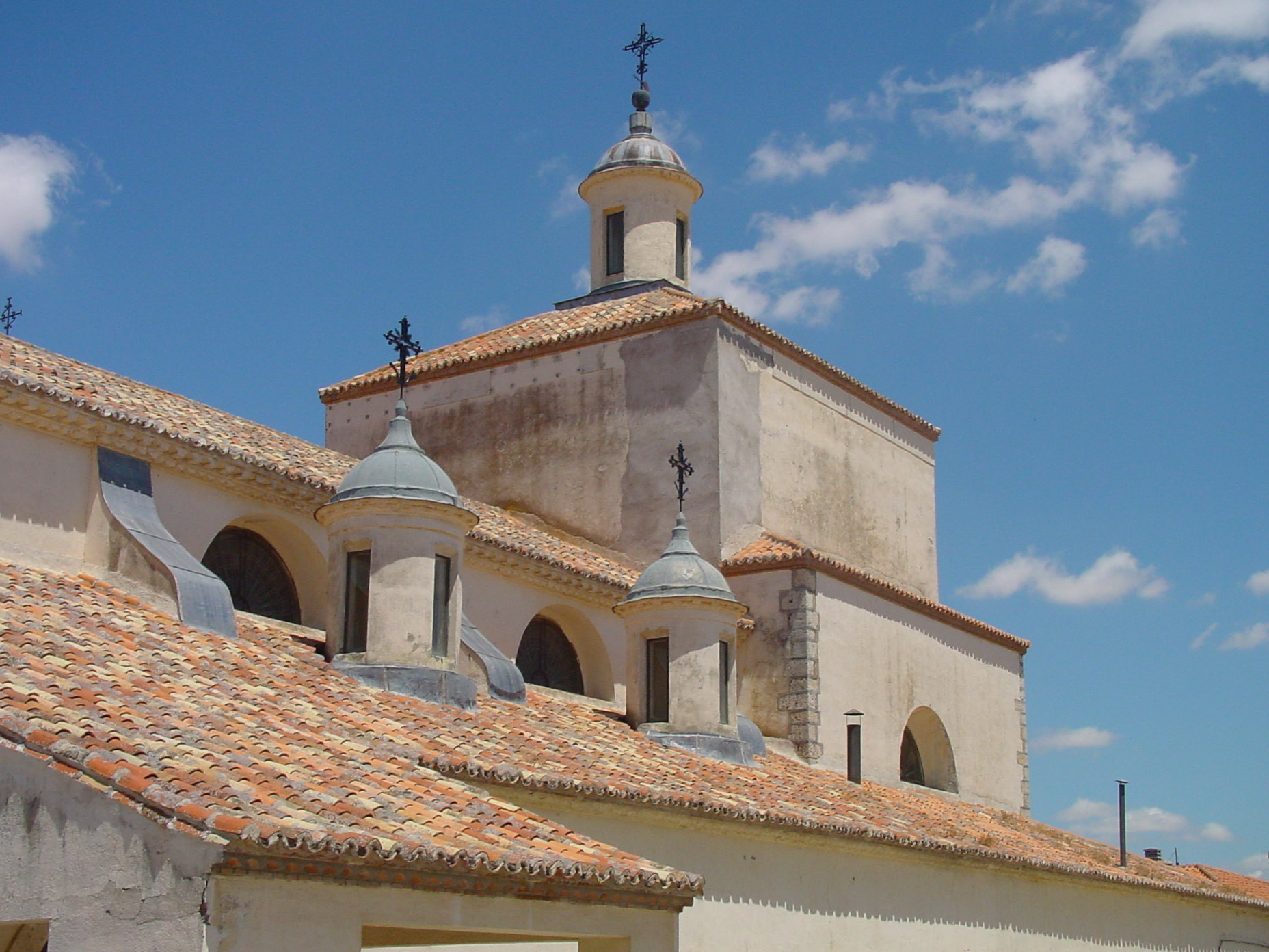 Campanario de iglesia en Brea de Tajo.